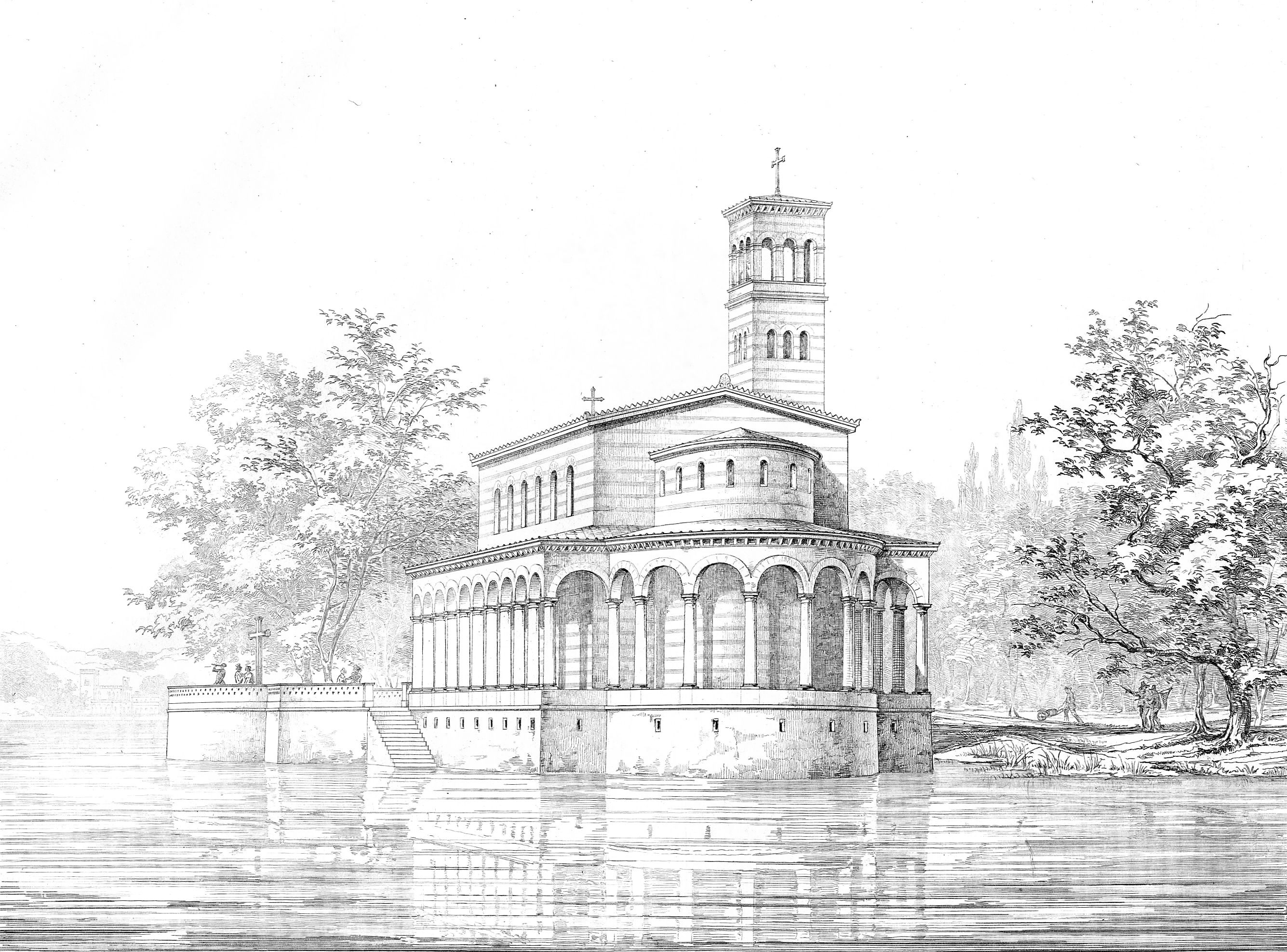 Ansicht der Kirche von Sacrow bei Potsdam